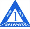 alta via 1